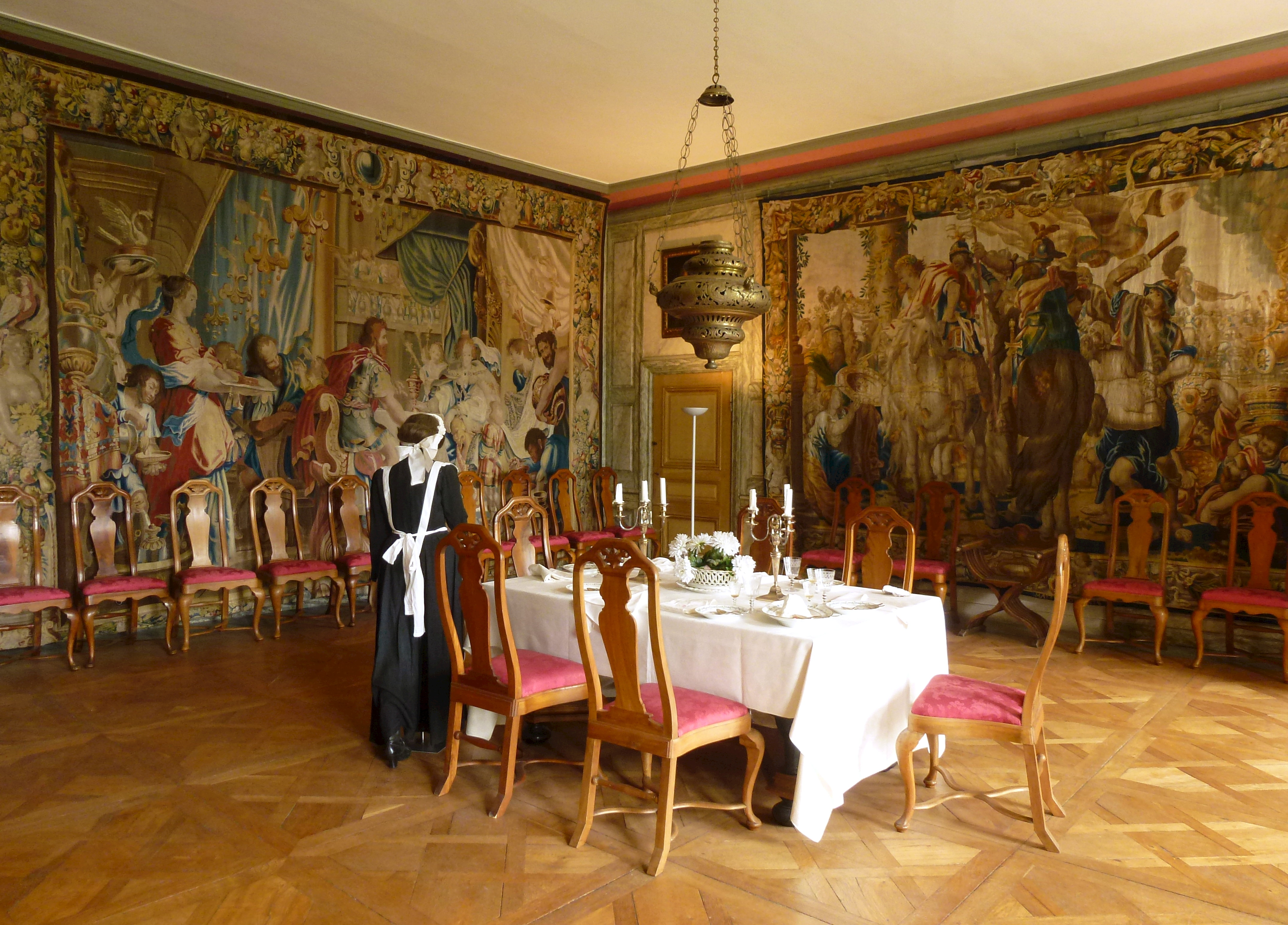 Tyresö slott Stora matsalen